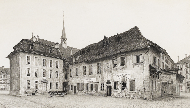 Blick auf die Spezereihandlung J. Schnorf in Bern. Aquarell über Tuschfeder, sig., datiert 1898 u. bez. "Berne", 27,5 x 48,5 cm